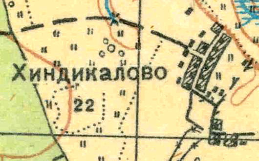 Топографическая карта Ленинградской области, квадрат О-35-24-Б-г (Б. Борницы), деревня Хиндикалово